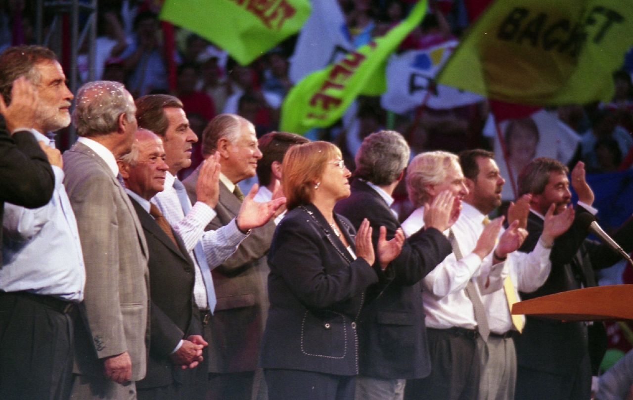 Michelle Bachelet durante la campaña de las elecciones presidenciales